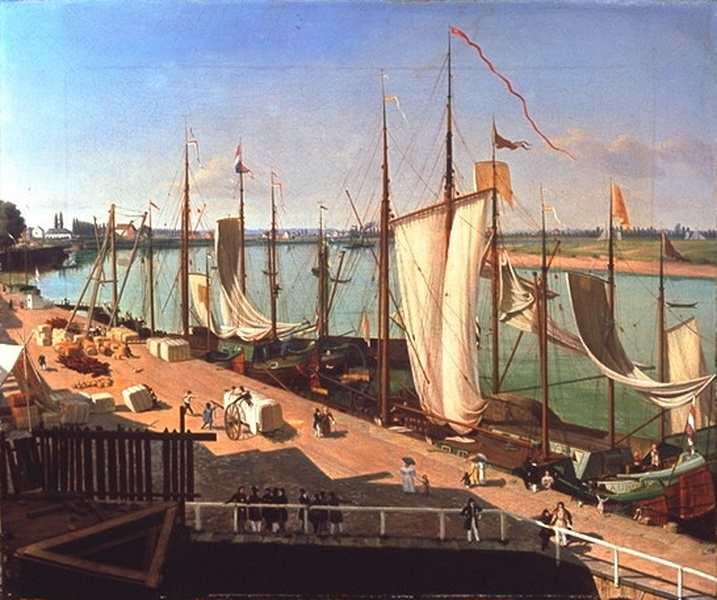 Der Düsseldorfer Hafen Bild, Tafelmalerei, Öl, Leinwand, 51 x 61 cm im Wallraf-Richartz-Museum - Fondation Corboud, Köln